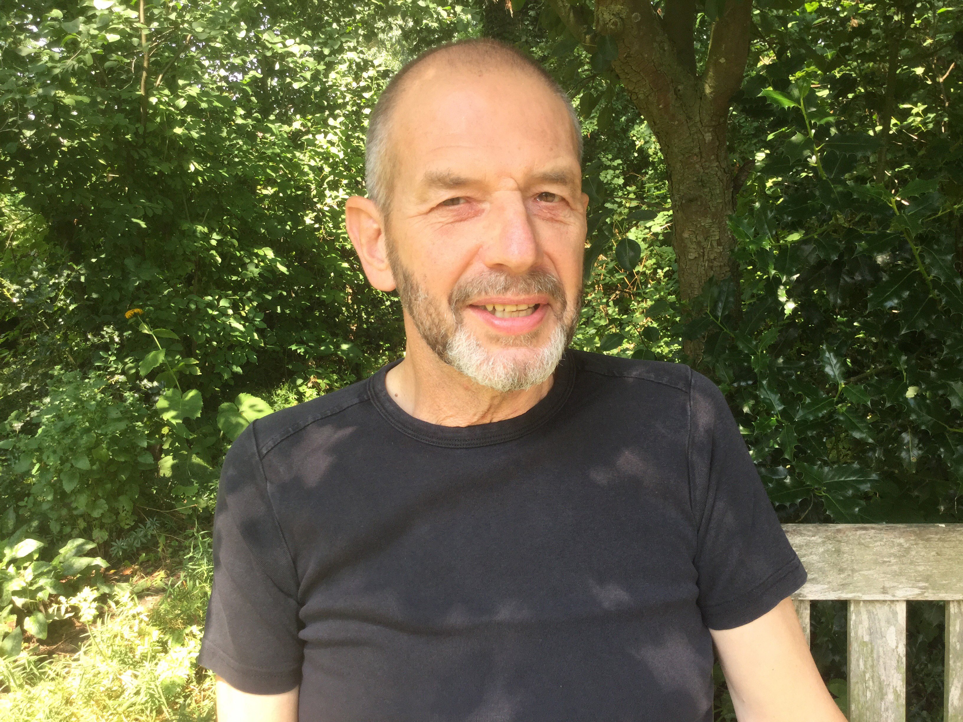 Cees Rutgers